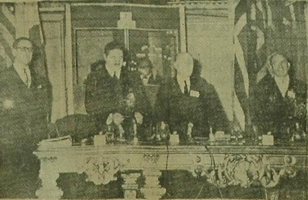 Bonifacio del Carril preside reunión consultiva del Tratado Antártico en la Cancillería Argentina.